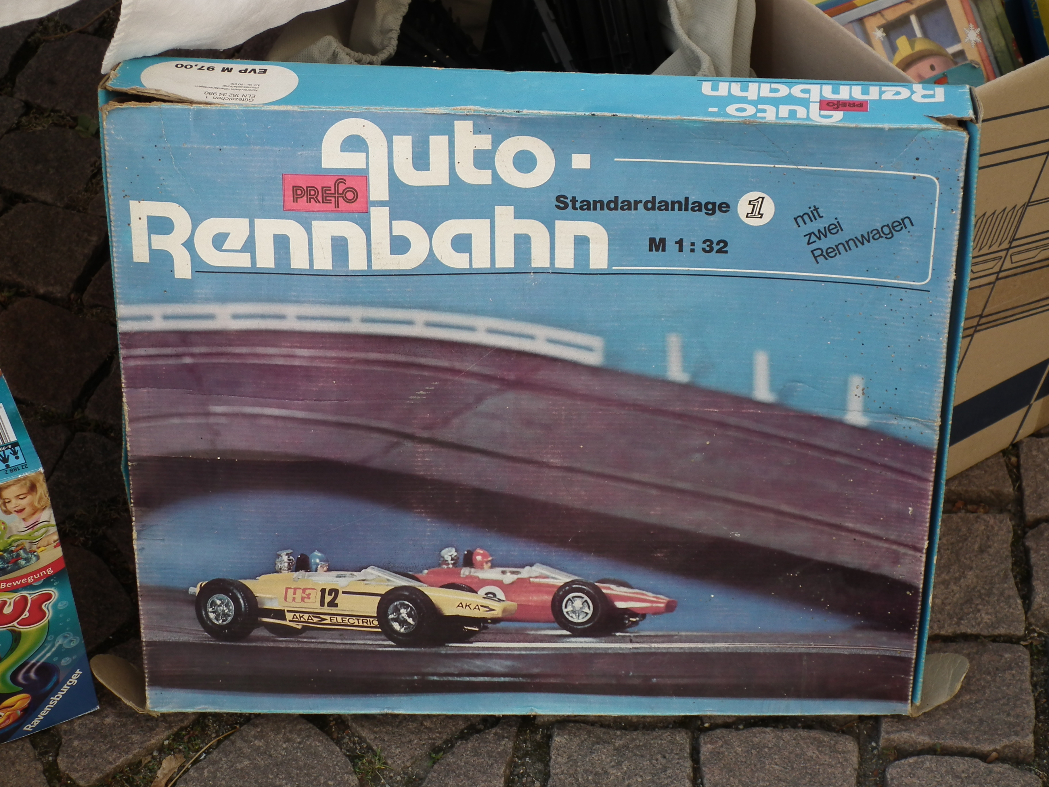 2019-09-14 Oschatz Stadtrundgang